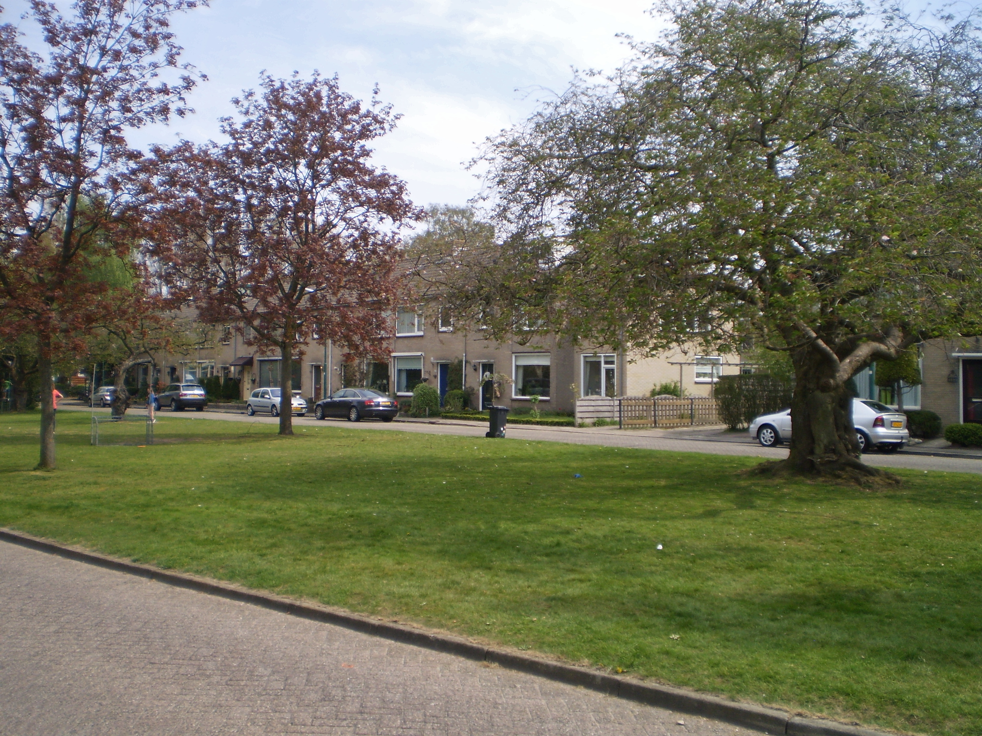 zichht richting Drakenburgerweg